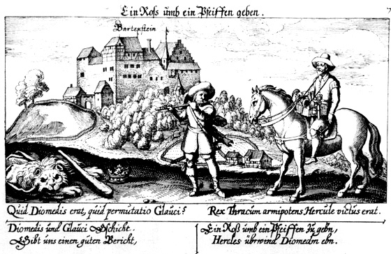 Burg Bartenstein in Bartenstein Teilort der Stadt Schrozberg im Landkreis Schwäbisch Hall in Baden-Würtemberg als Emblemhintergrund in Daniel Meissners Sammlung Schatzkästlein (Thesaurus Philopoliticus) Quinta Pars auf Seite 215 dargestellt. Die irreführende Dateibezeichnung rührt von einer falschen Zuordnung zu einem anderen Objekt her, wurde aber der Einfachheit halber für Wikipedia nicht korrigiert.